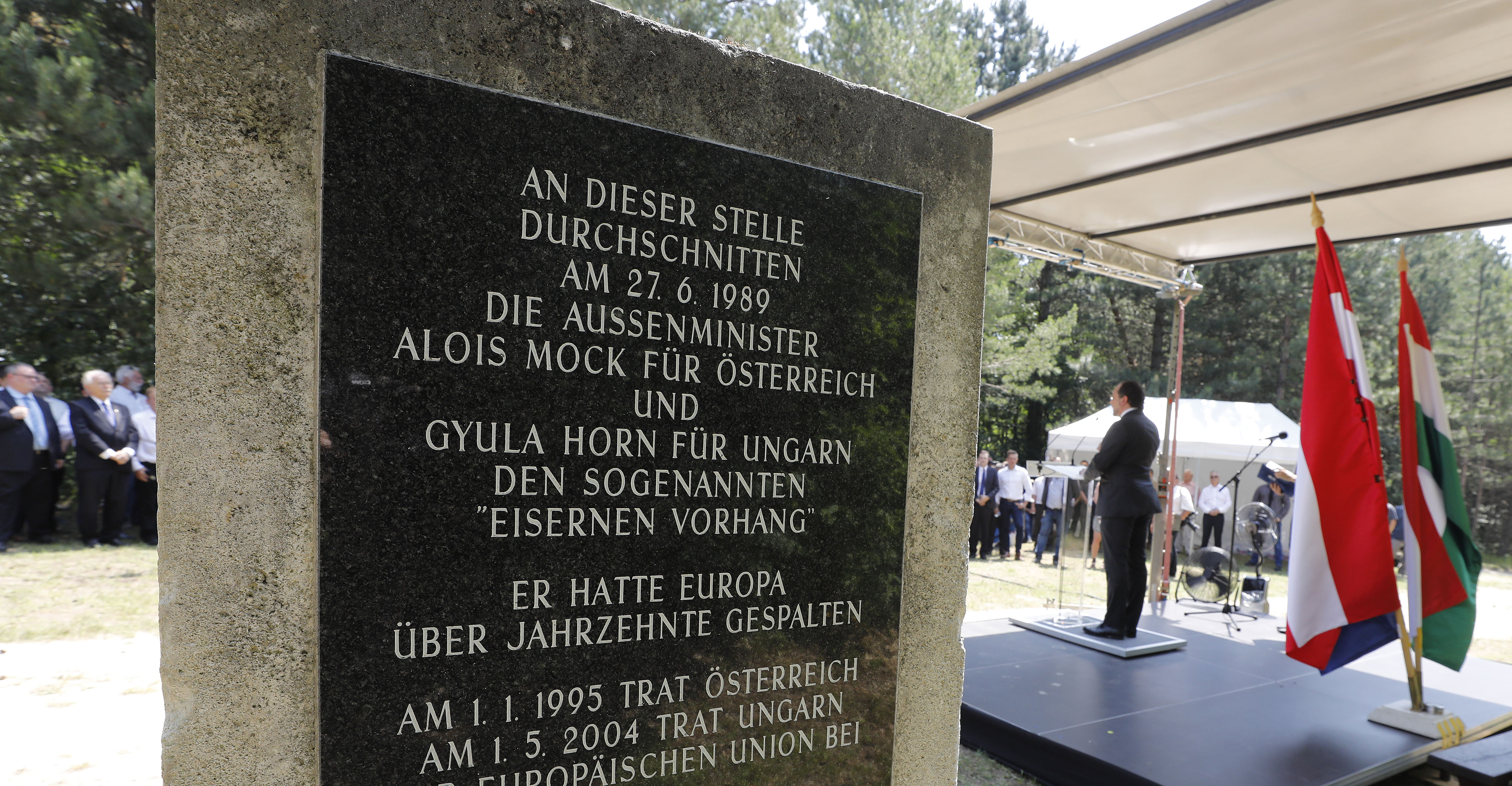 Gedenkveranstaltung 30 Jahre Fall des Eisernen Vorhangs. Mit BM Schallenberg, ungarischem AM Szijjarto und LH Doskozil. Sopron. 27.06.2019, Foto: Dragan Tatic